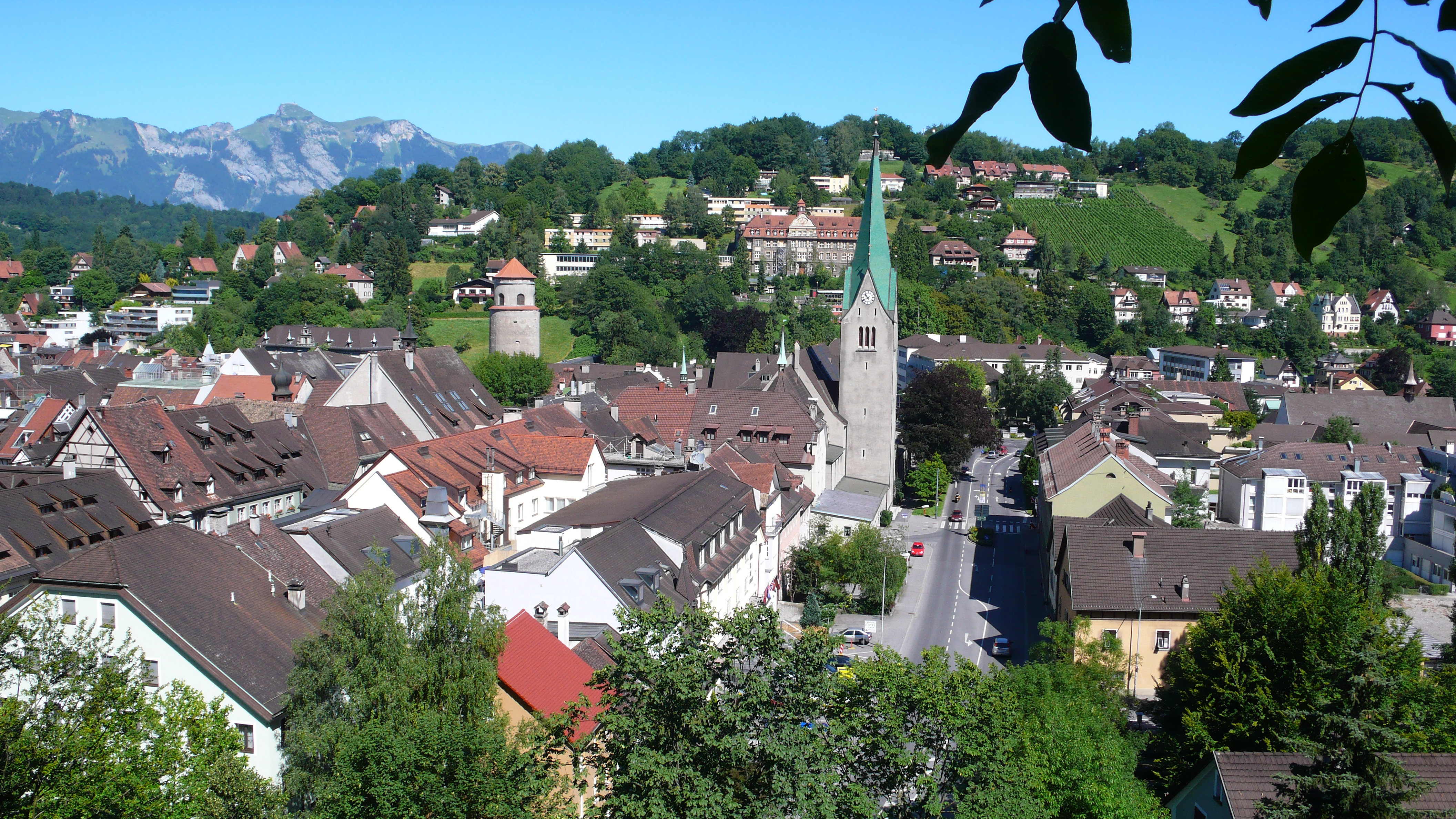 Feldkirch, Vorarlberg